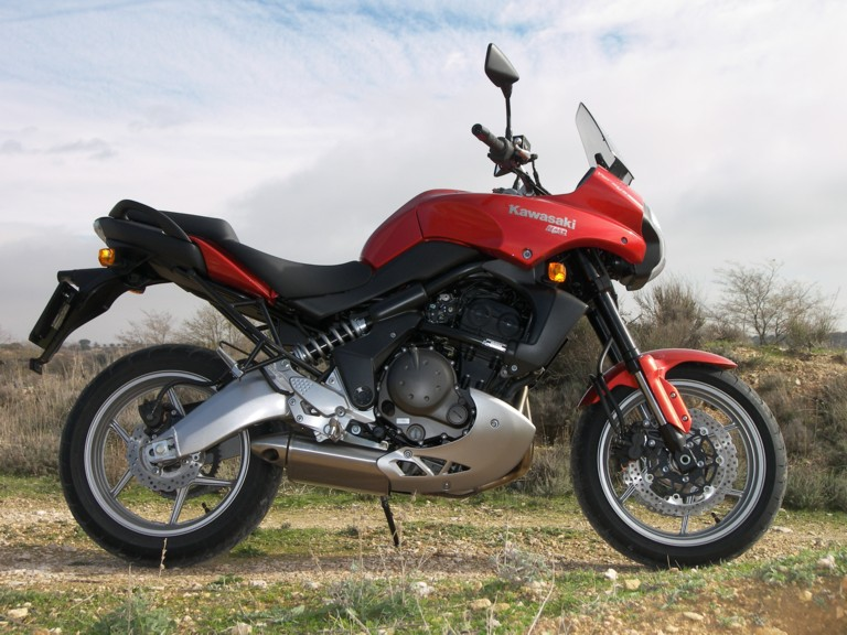 Kawasaki Versys motorcycle